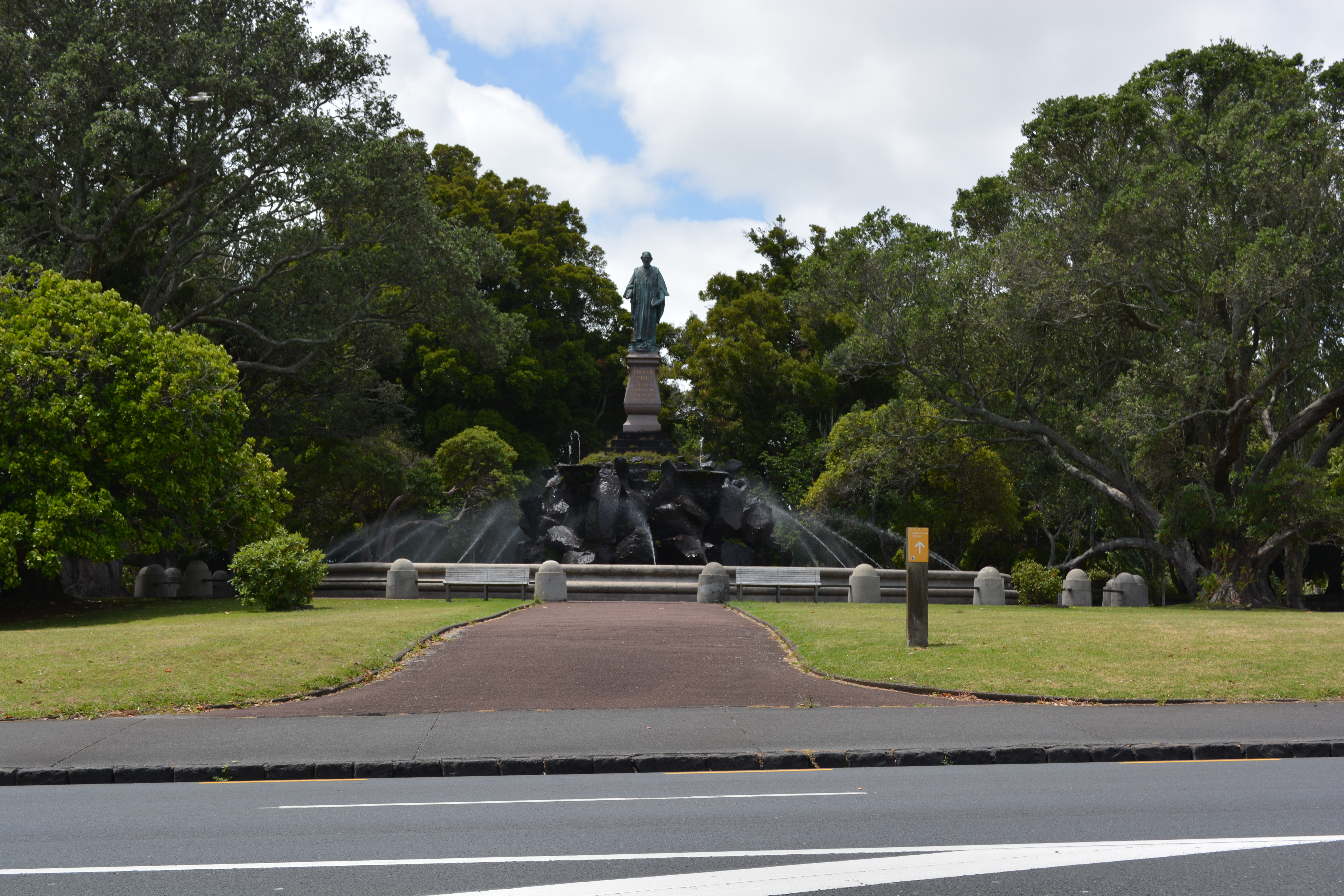 Epson Auckland,New Zealand